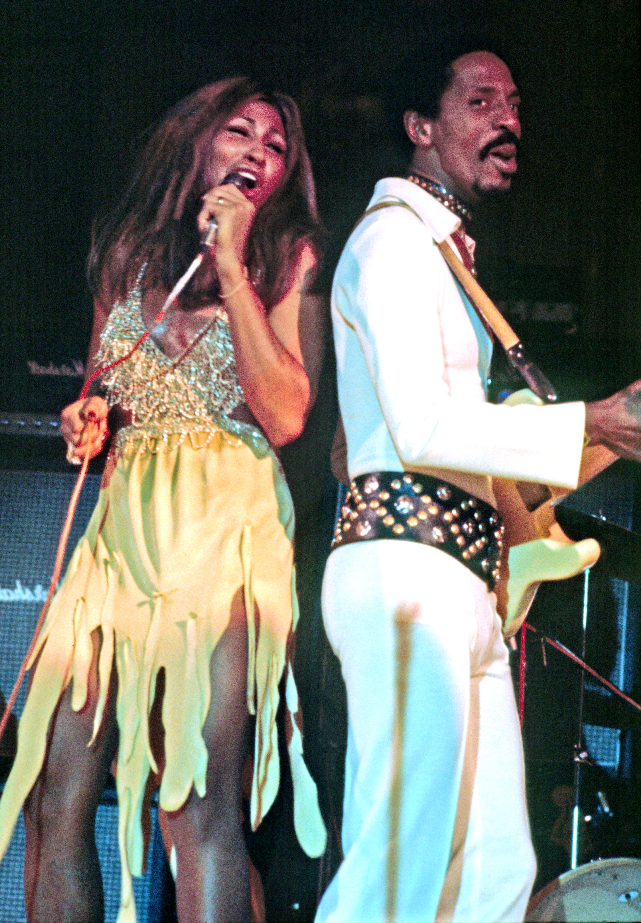 Tina Turner, noch mit Ex Ike, November 1972, Musikhalle Hamburg